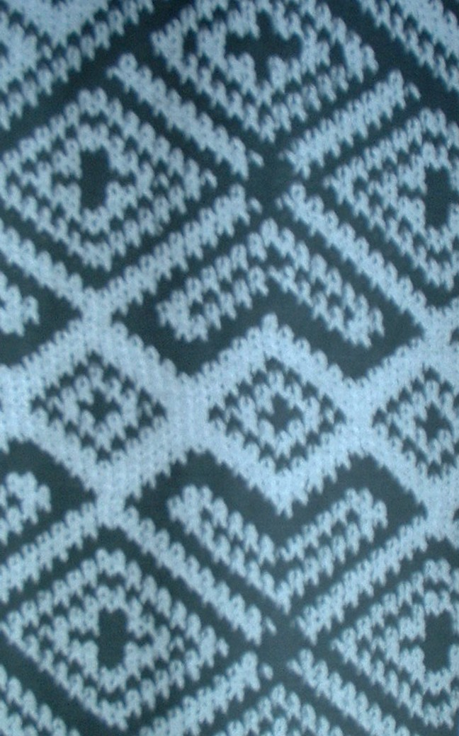 Achtschlossmuster: Interlock-Jacquardbindung